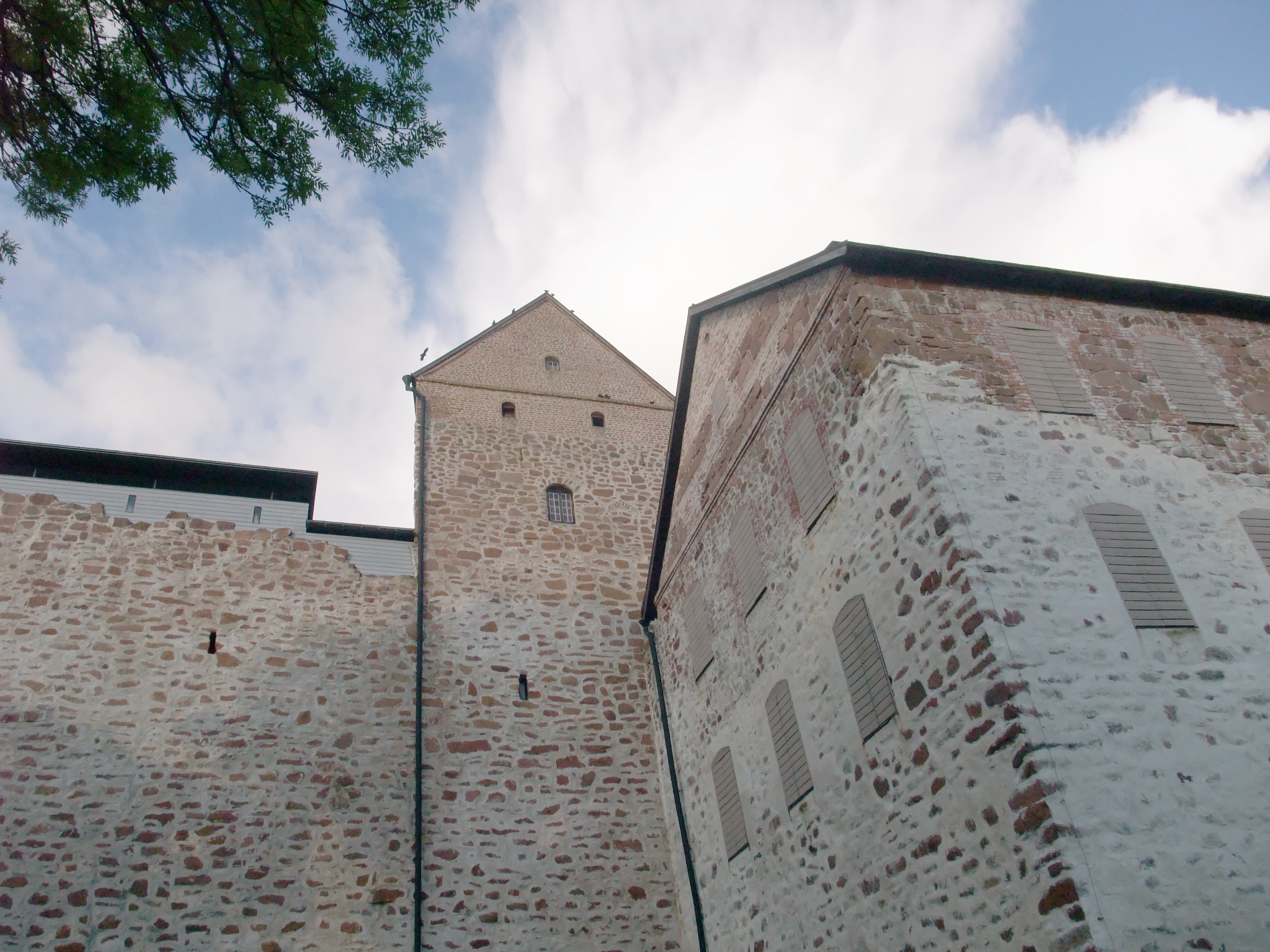 Kasterholms slott i Oktober 2009. Åland, Sund.